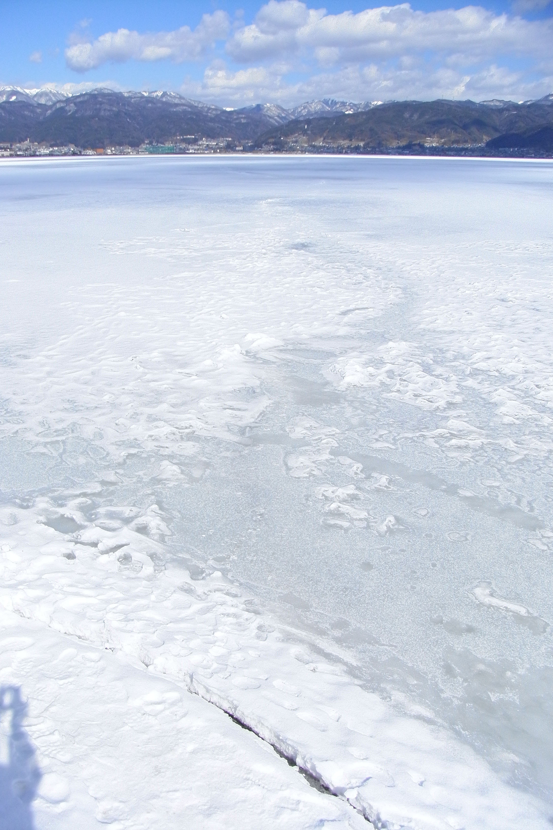 2008年 長野県諏訪湖の神渡（みわたり）から数日後の神渡の写真です。湊（西側）から撮影しています。 中央の氷がわずかに盛り上がってつづいているのが神渡です。時間が立っている為かなり低くなっています。